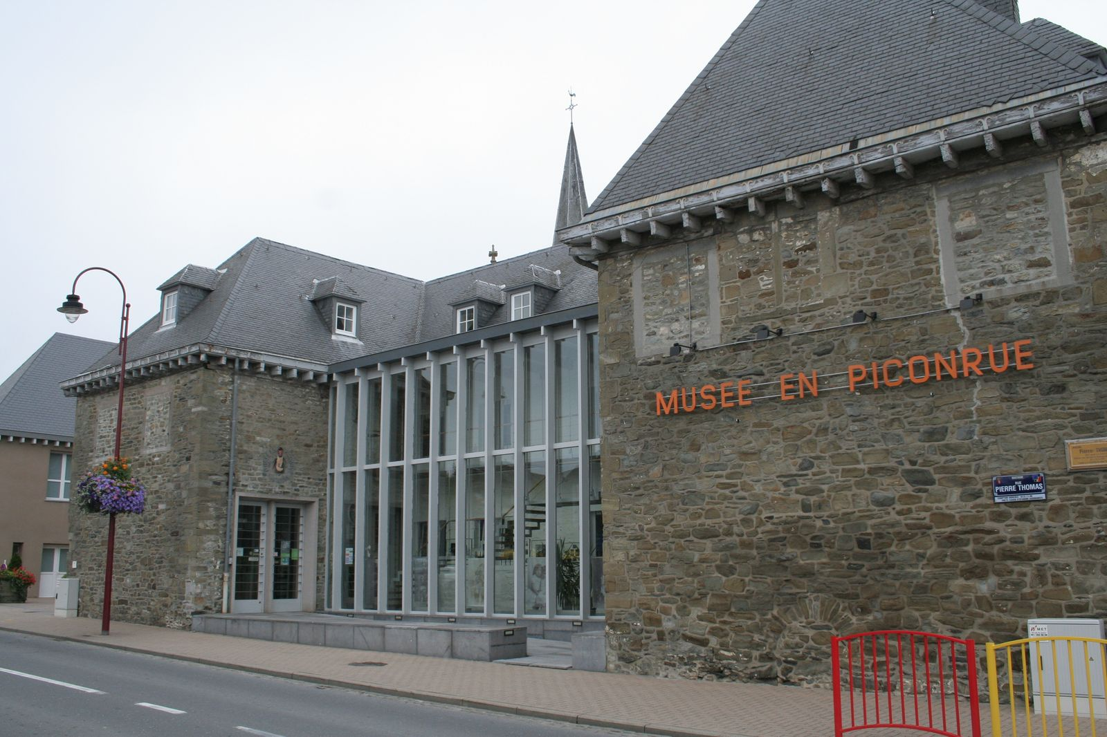 Le Musée en Piconrue (Bastogne) . Photo août 2008.